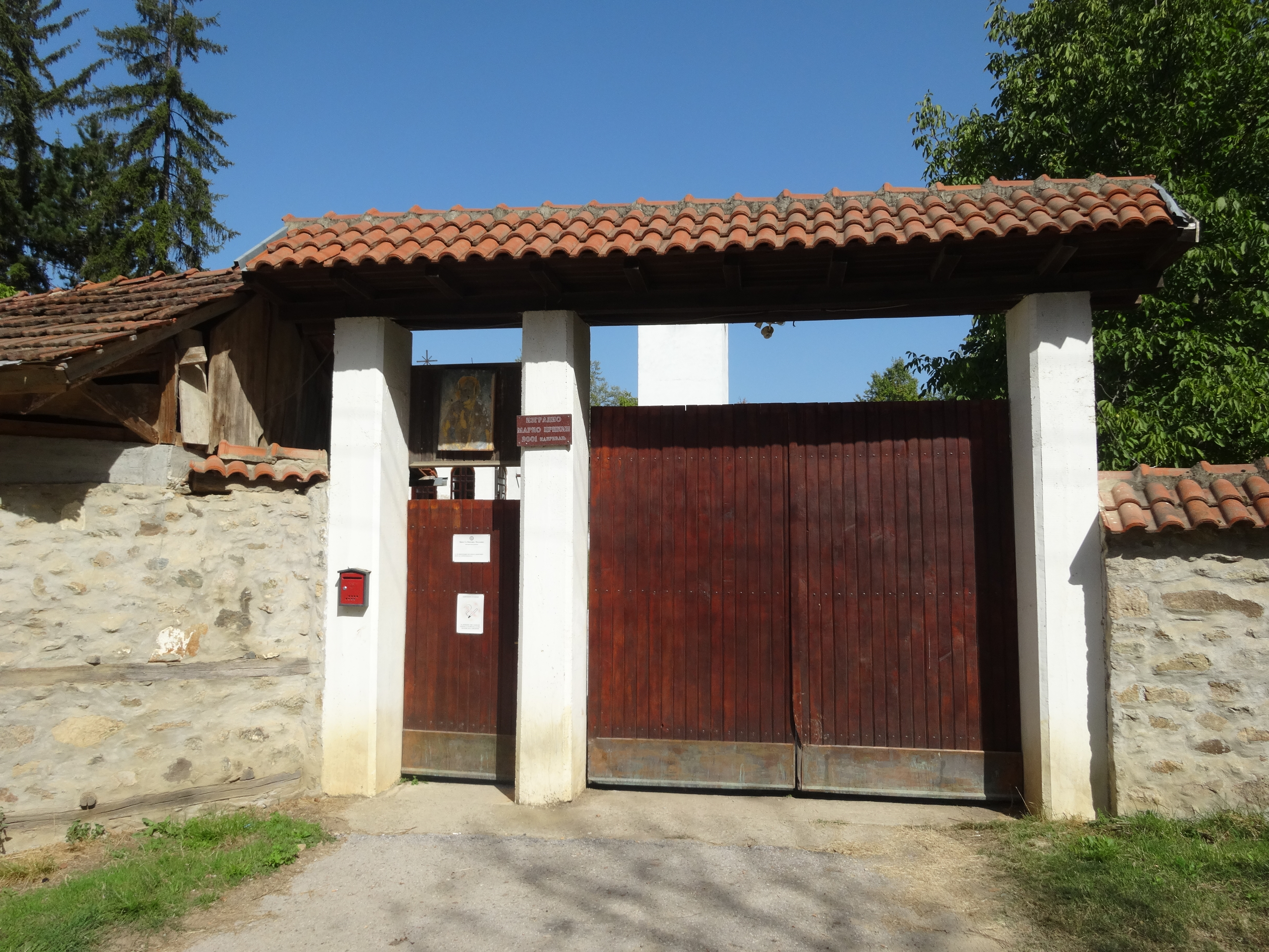 Čukljenik, Leskovac